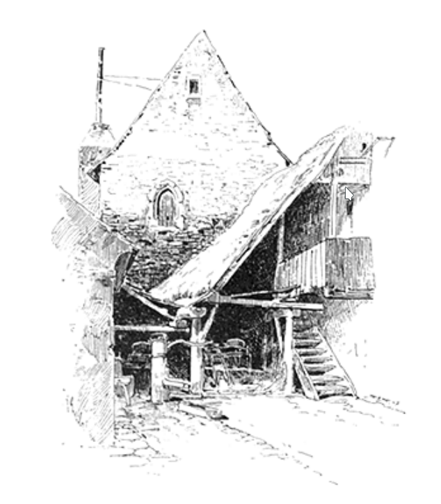 Luby – dvůr tvrze před snížením vstupní věže